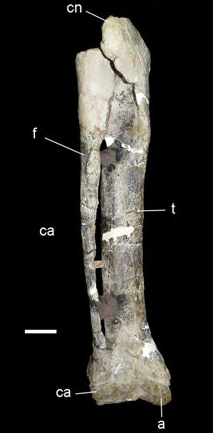 Articulated tibia, fibula, astragalus and calcaneum of Xenotarsosaurus (UNPSJB PV 194/1; Universidad Nacional de la Patagonia ‘San Juan Bosco’, Chubut, Argentina). Scale bar: 5 cm.